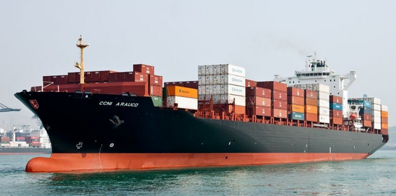 Nave 4.400 teus